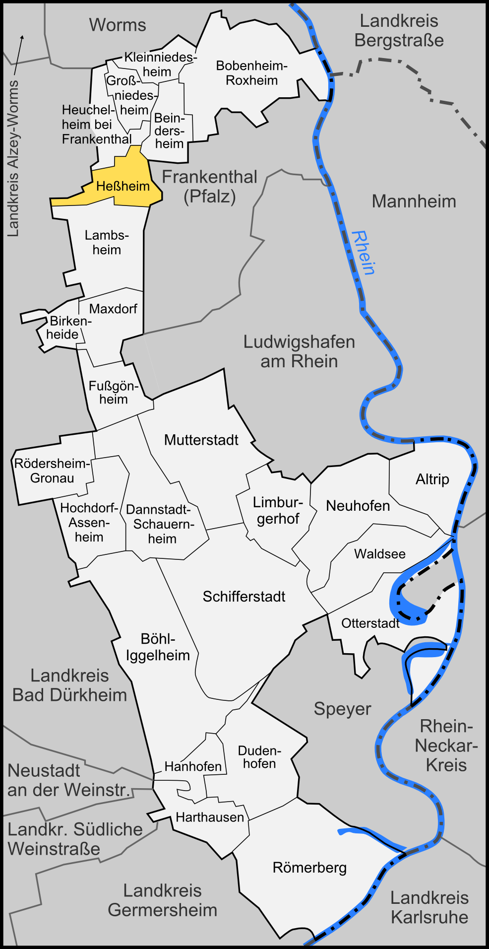 Karte der Gemeinde Heßheim im Rhein-Pfalz-Kreis